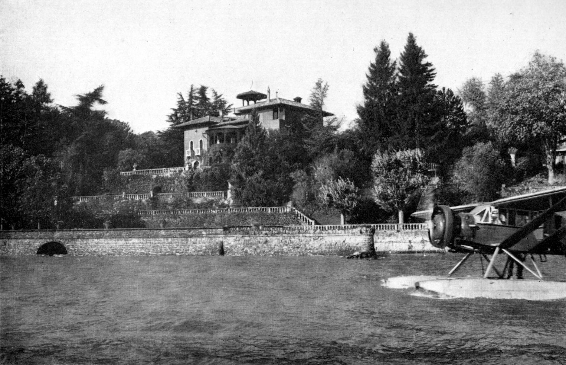 Les Terasses. Haus von A. C. Klebs in Nyon